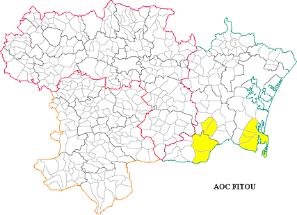 Aire de Fitou sur la carte de l'Aude